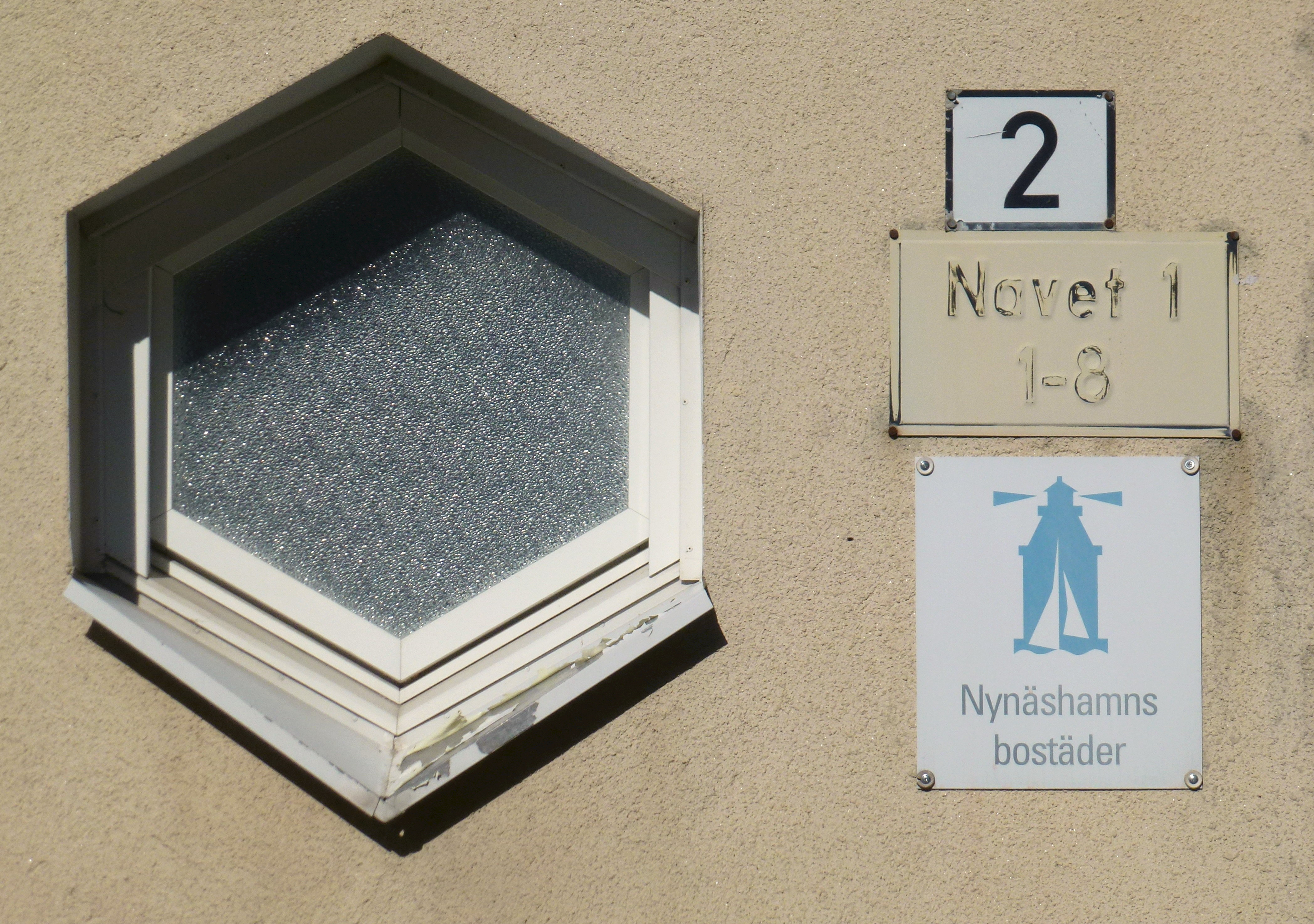 Stora Vika, husnummer "Navet 1"